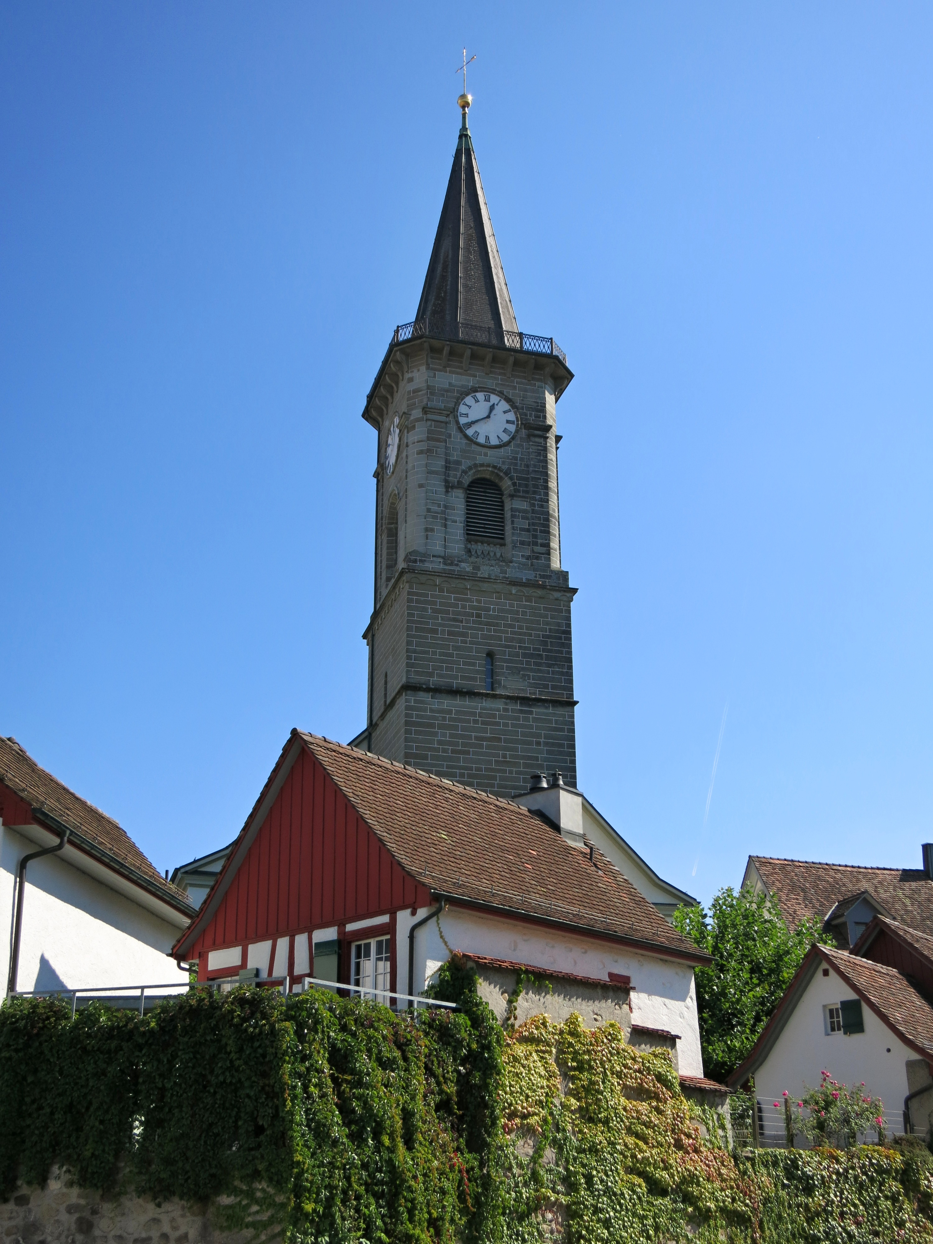 Turm der Evangelischen Kirche Steckborn